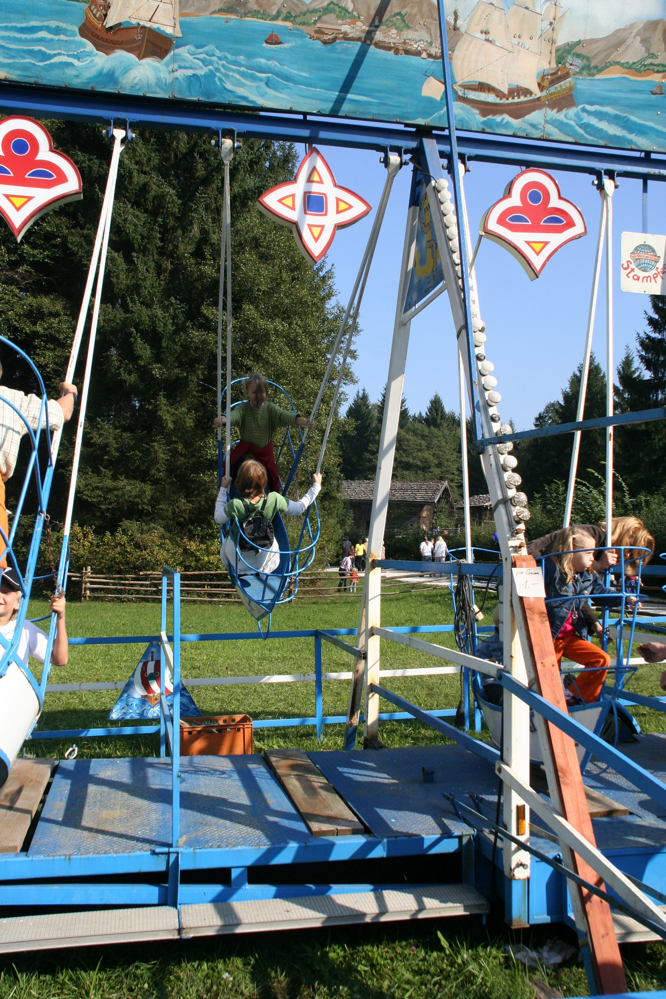 Amusement_rides